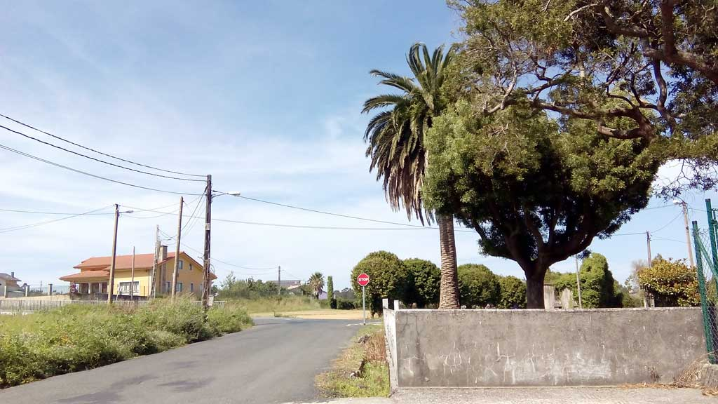 Vista da Igrexa.